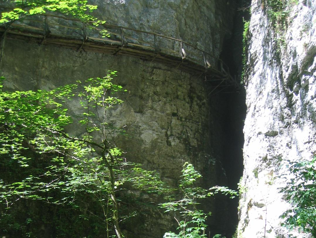 Pokljuška soteska